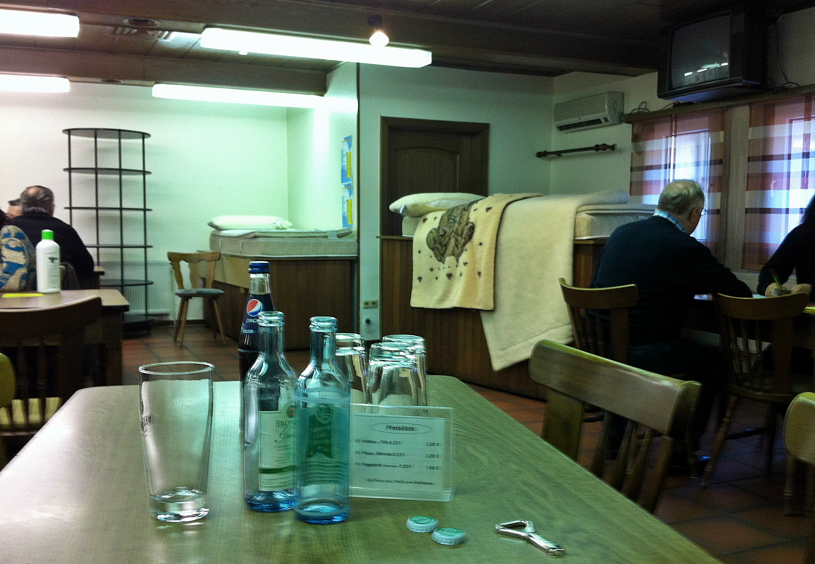 Haltern am See, Prickingshof: Teilnehmer einer Kaffeefahrt während einer Verkaufsveranstaltung im Prickingshof. Im Angebot u.a. Matratzen, Matratzenauflagen, Decken, Lotionen (z.B. Nachtkerzenbalsam) in Plastikflaschen. Rechts: Kunde bei der Aufgabe einer Bestellung.